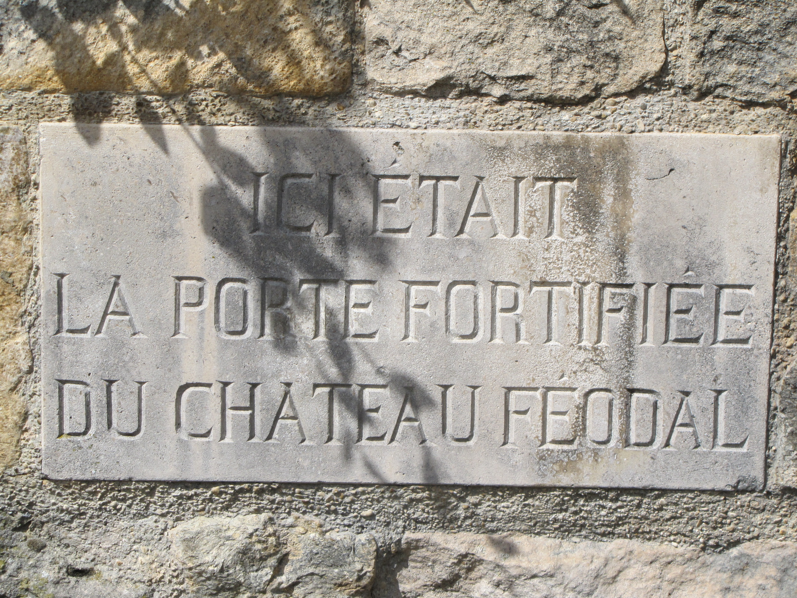 Isle-Aumont (Aube, 10) : Plaque marquant l'ancienne entrée fortifiée du château féodal.